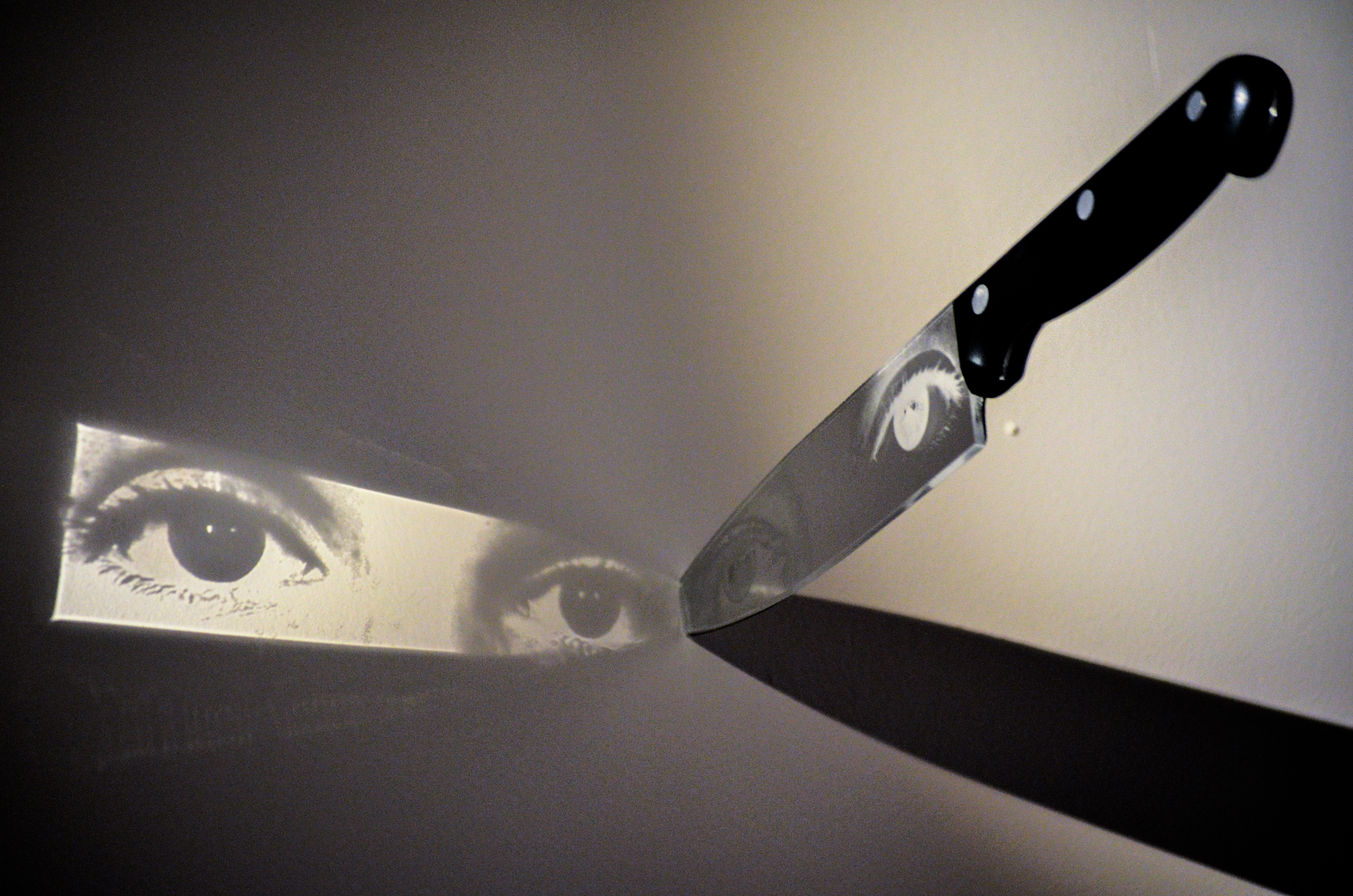 Exposición Banco de la República 2015 Bogotá D.C., Colombia Nada está donde se cree